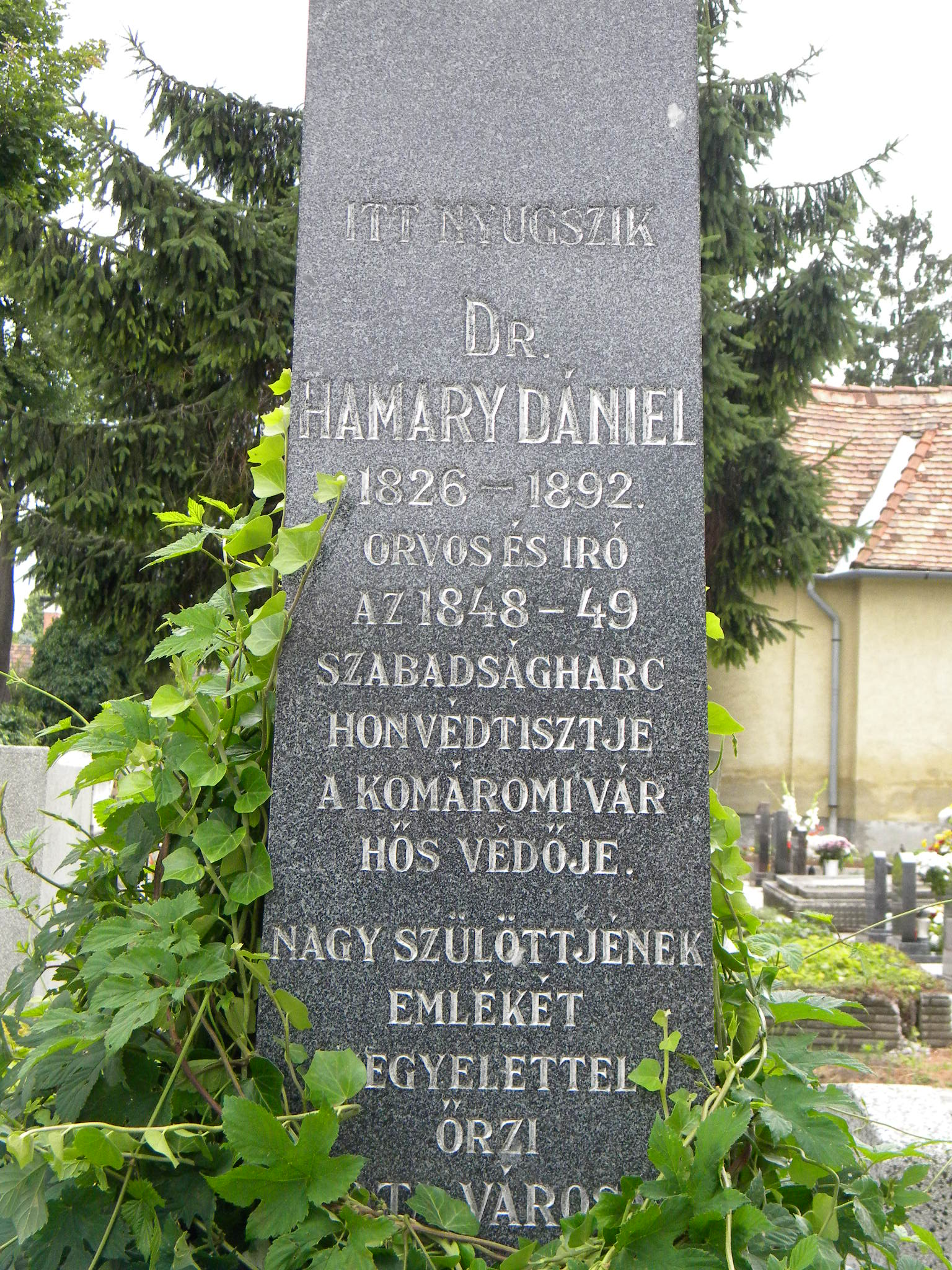 Sírkő Hamary Dániel nyughelyén.